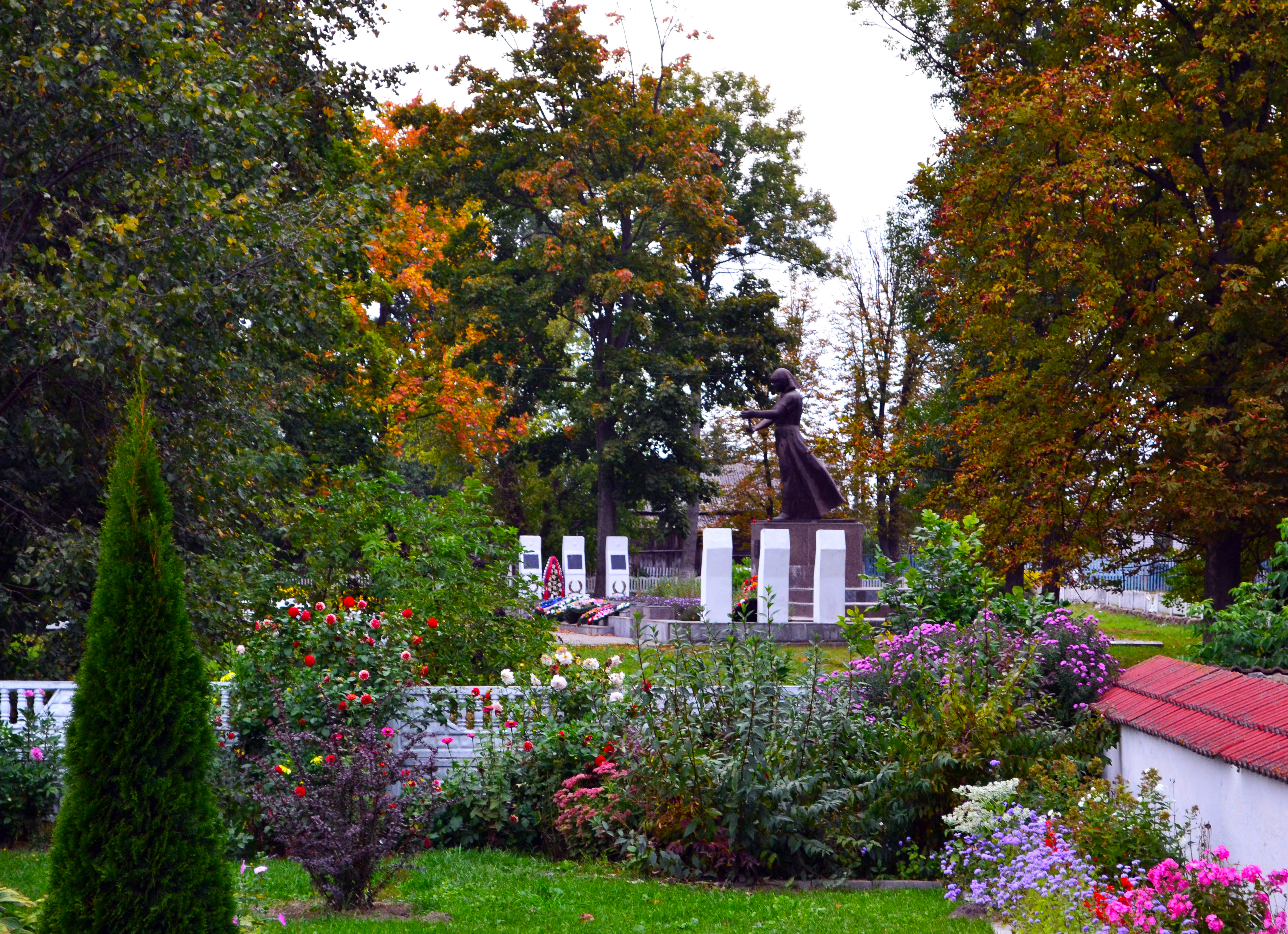 Беларуская (тарашкевіца): Братэрская магіла (1944), в. Чарнаўчыцы This is a photo of Belarusian heritage monument. Reference number: 112Г000123 ( WLM)